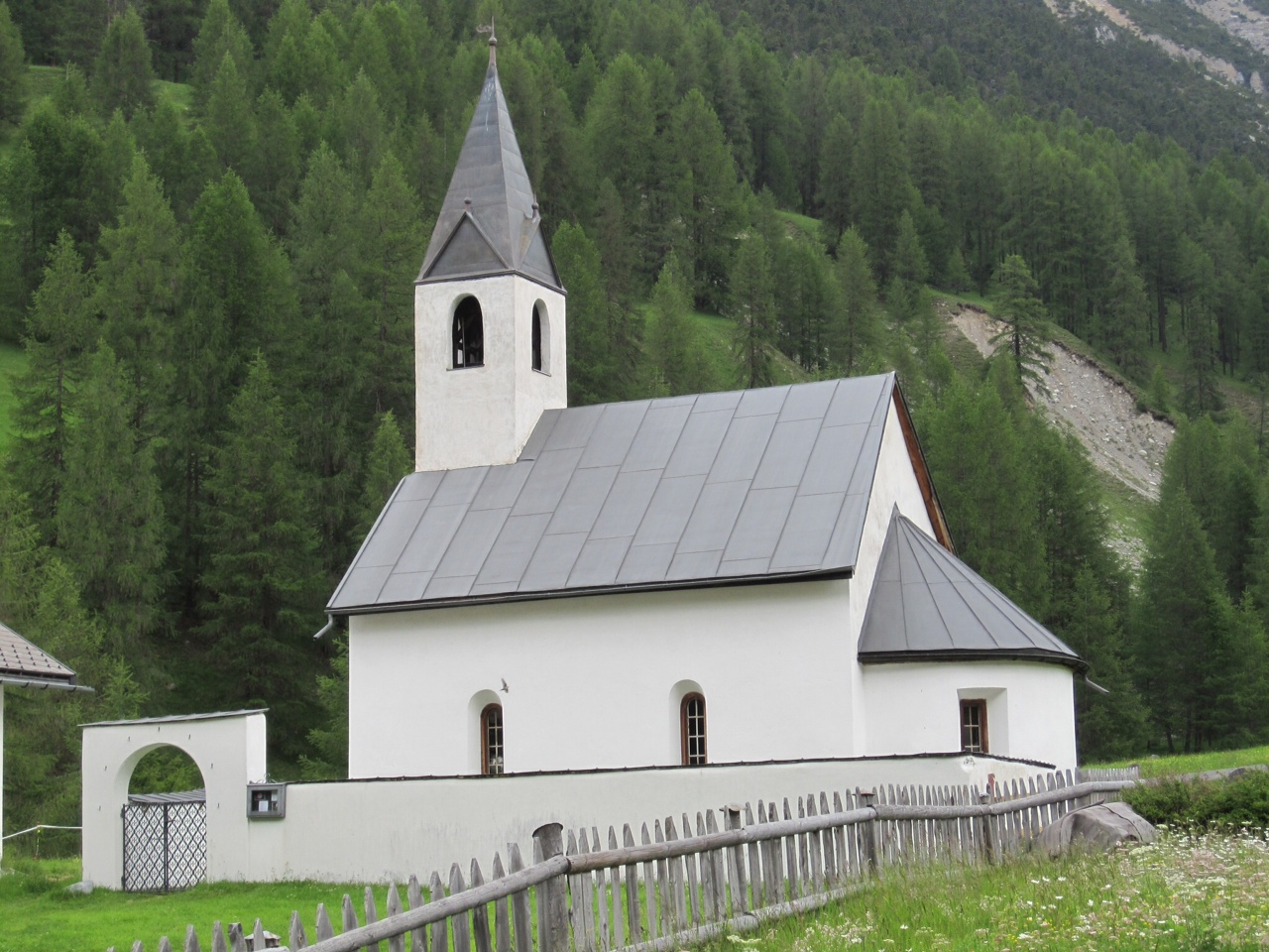 reformierte Kirche in S-charl (bei Scuol im Unterengadin)